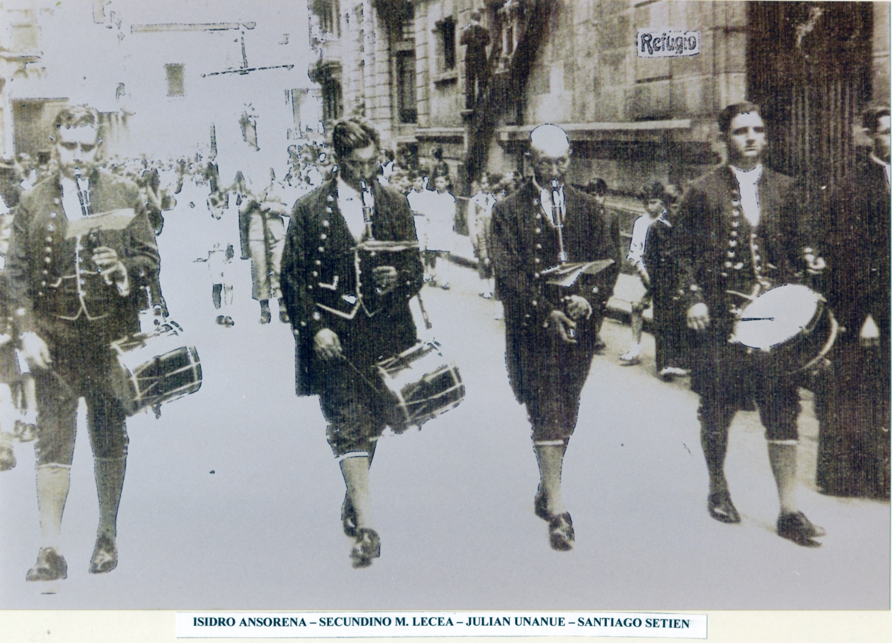 Donostiako txistulariak San Juan